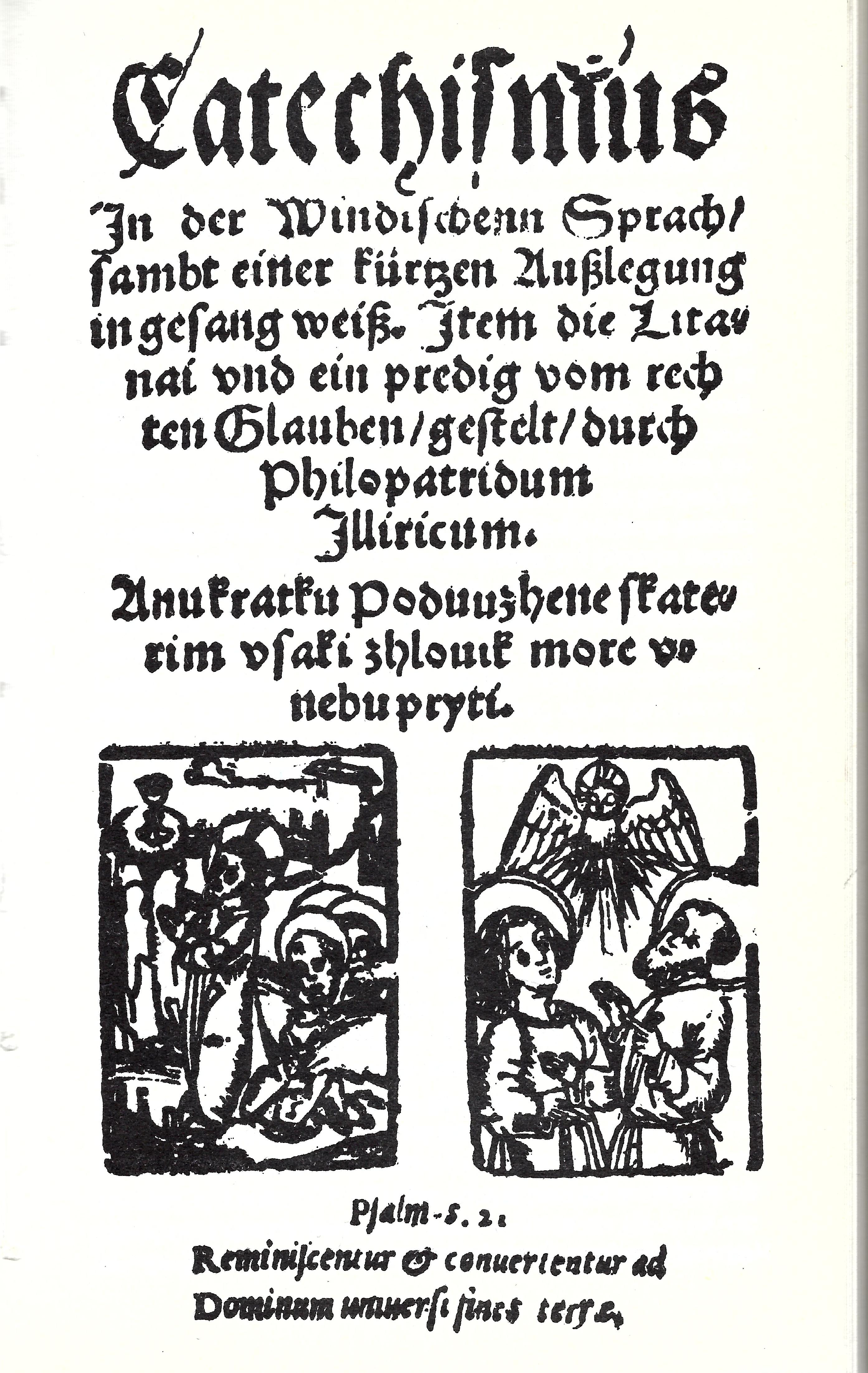 Katekizmus, naslovnica